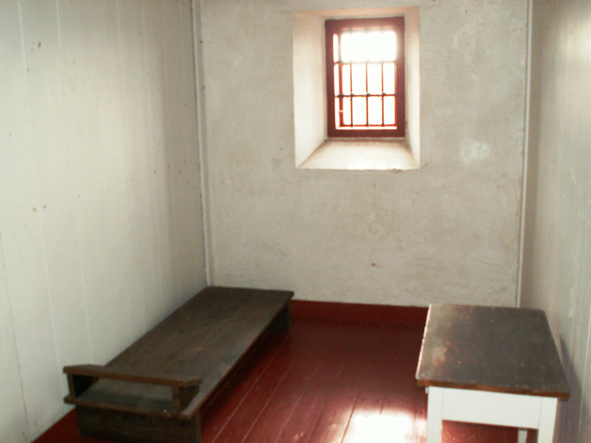 cela dr Dampe